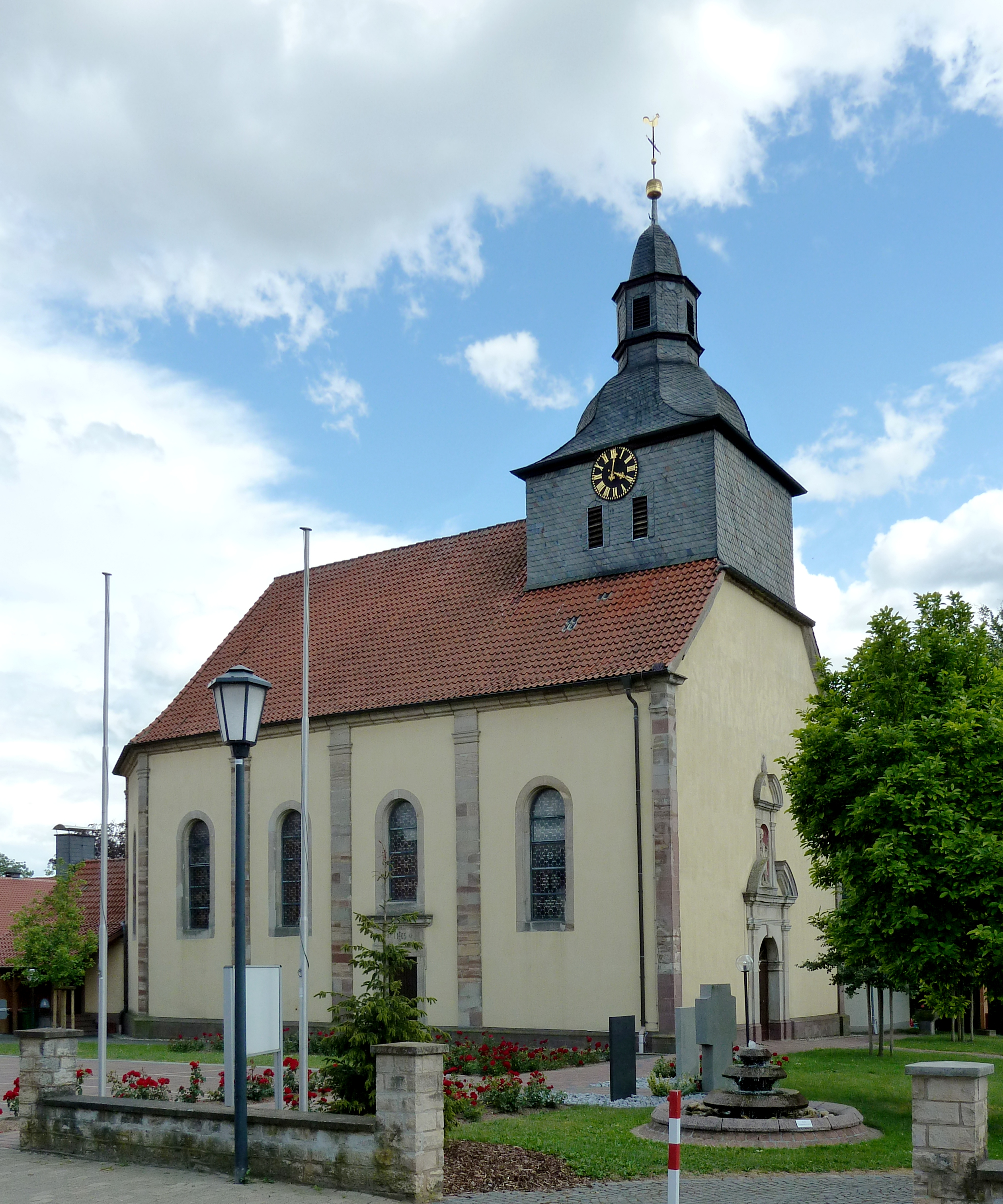 Katholische Kirche St. Urban in Werxhausen, Stadt Duderstadt, Niedersachsen. Erbaut 1741–44 unter Leitung von Jahann Christoph Fritz